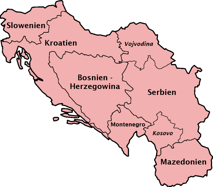 Administrative Gliederung Jugoslawiens 1945-1991 (deutsche Beschriftung)